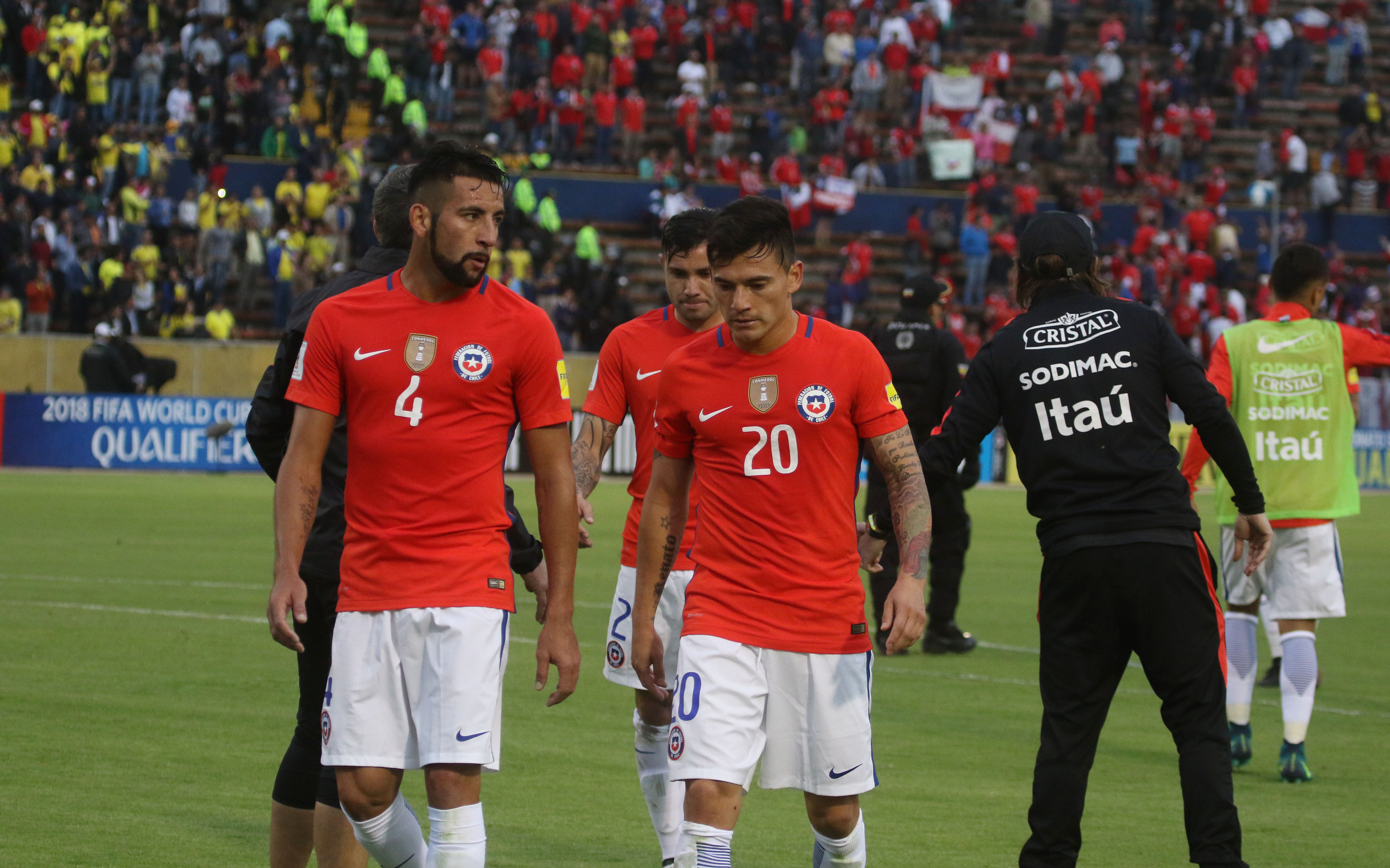 Quito, 6 oct (Andes).- Ecuador (amarillo) volvió a mostrar la imagen que lo llevó a ganar los primeros cuatro partidos en seguidilla de las Eliminatorias al Mundial Rusia 2018 y con algunas variantes se impuso por 3-0 a Chile en el estadio Olímpico Atahualpa de Quito.ANDES/Micaela Ayala V.